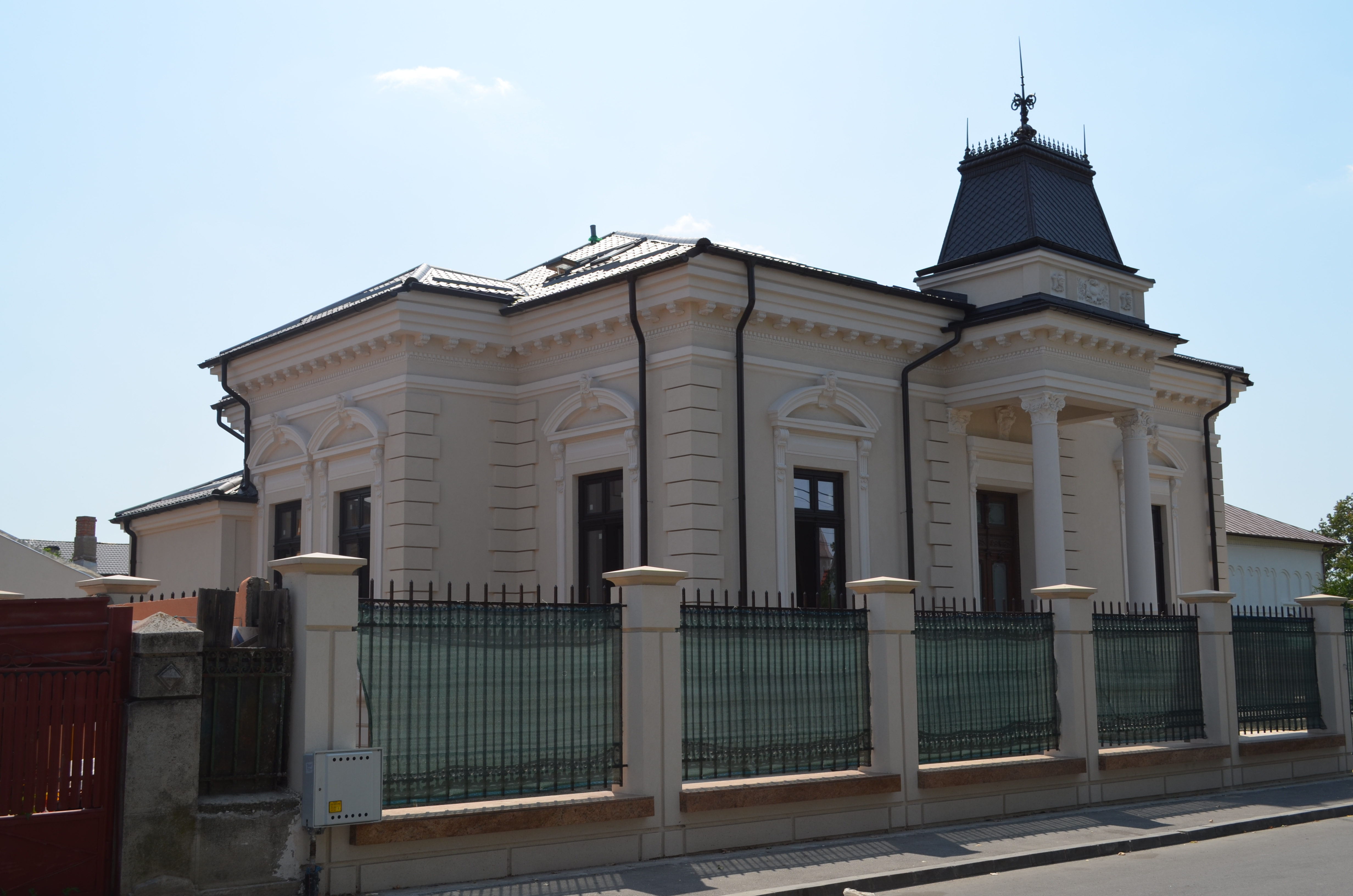 Casă, Str. Locotenent Pârvan Popescu nr. 11, Târgoviște